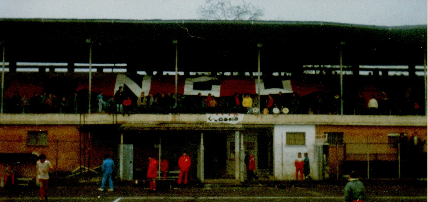 coreografia dei tifosi del Colleferro calcio, il gruppo Nuova Guardia Ultrà (NGU)